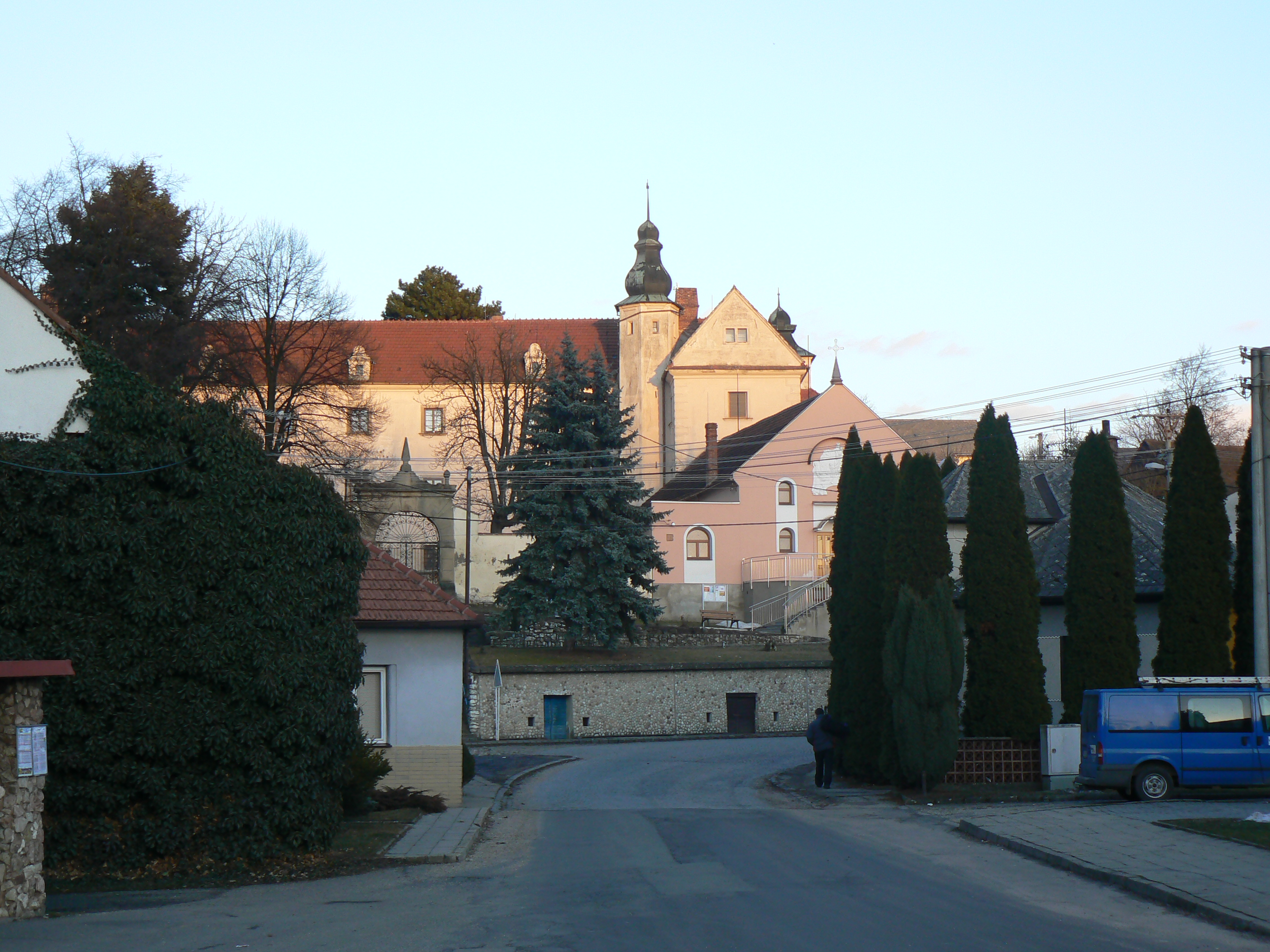 Ořechov, okres Uherské Hradiště - zámek 6. This photograph was taken within the scope of the 'Czech Municipalities Photographs' grant.